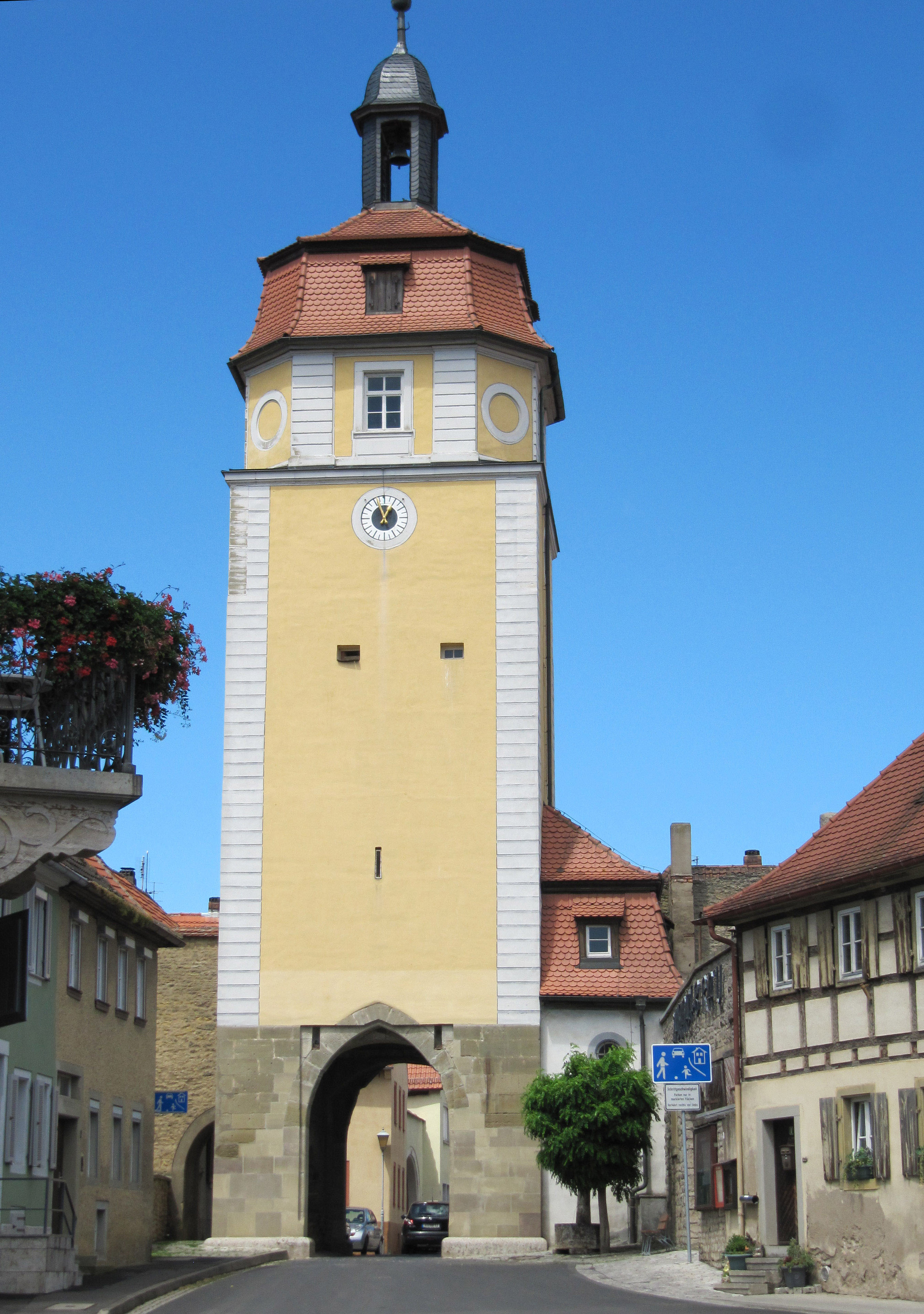 Am Oberen Tor im SO sind die Halterungen für die Zugbrücke noch gut zu erkennen